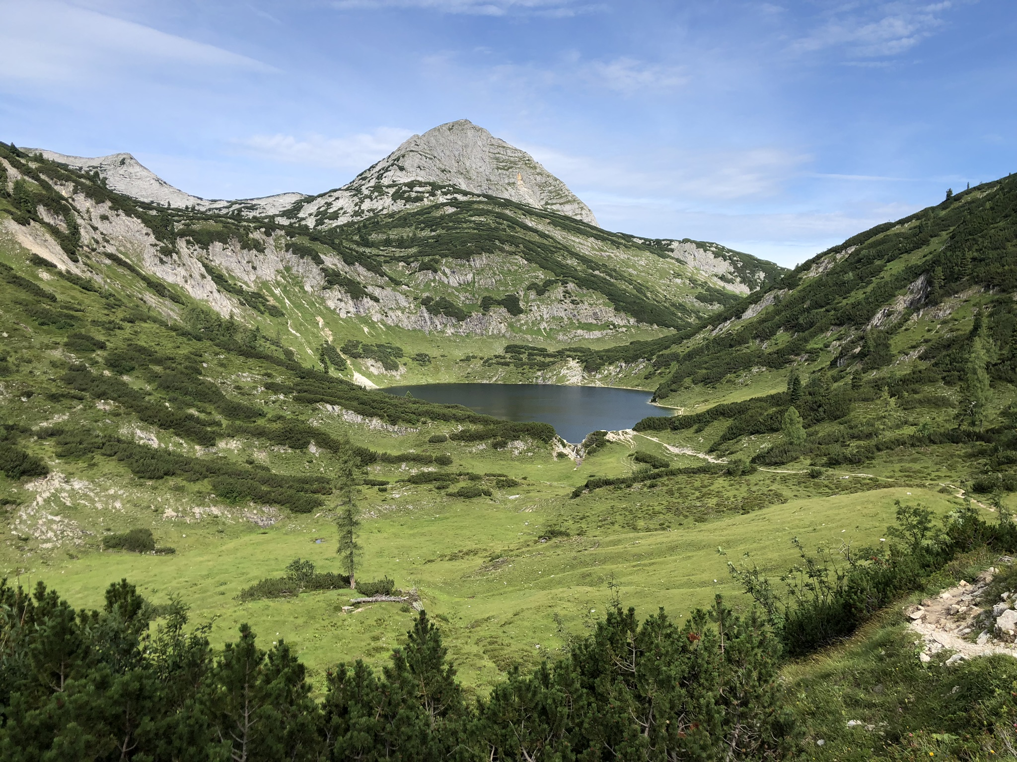 4. Etappe des Welser Höhenweges: Im Vordergrund der Wildensee, im Hintergrund erhebt sich mächtig der Rinnerkogel (2012 m)